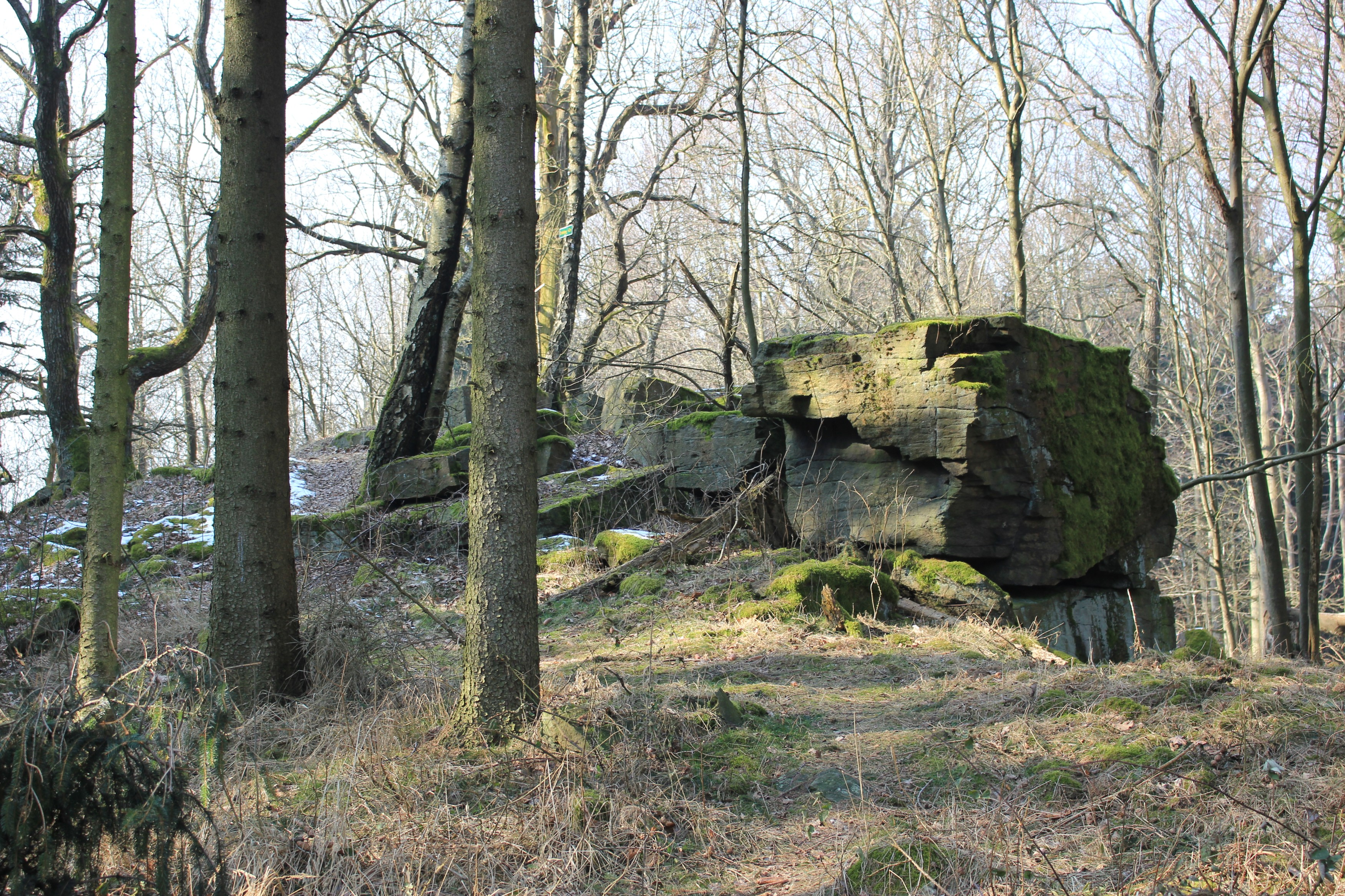 Hornjoserbsce: Skały na wjeršku Lubina.